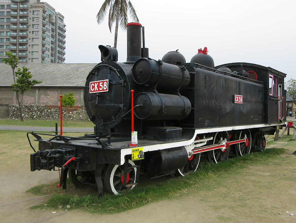 靜態保存於舊打狗驛故事館（高雄港站）的臺灣鐵路管理局CK50型蒸汽機車CK58。